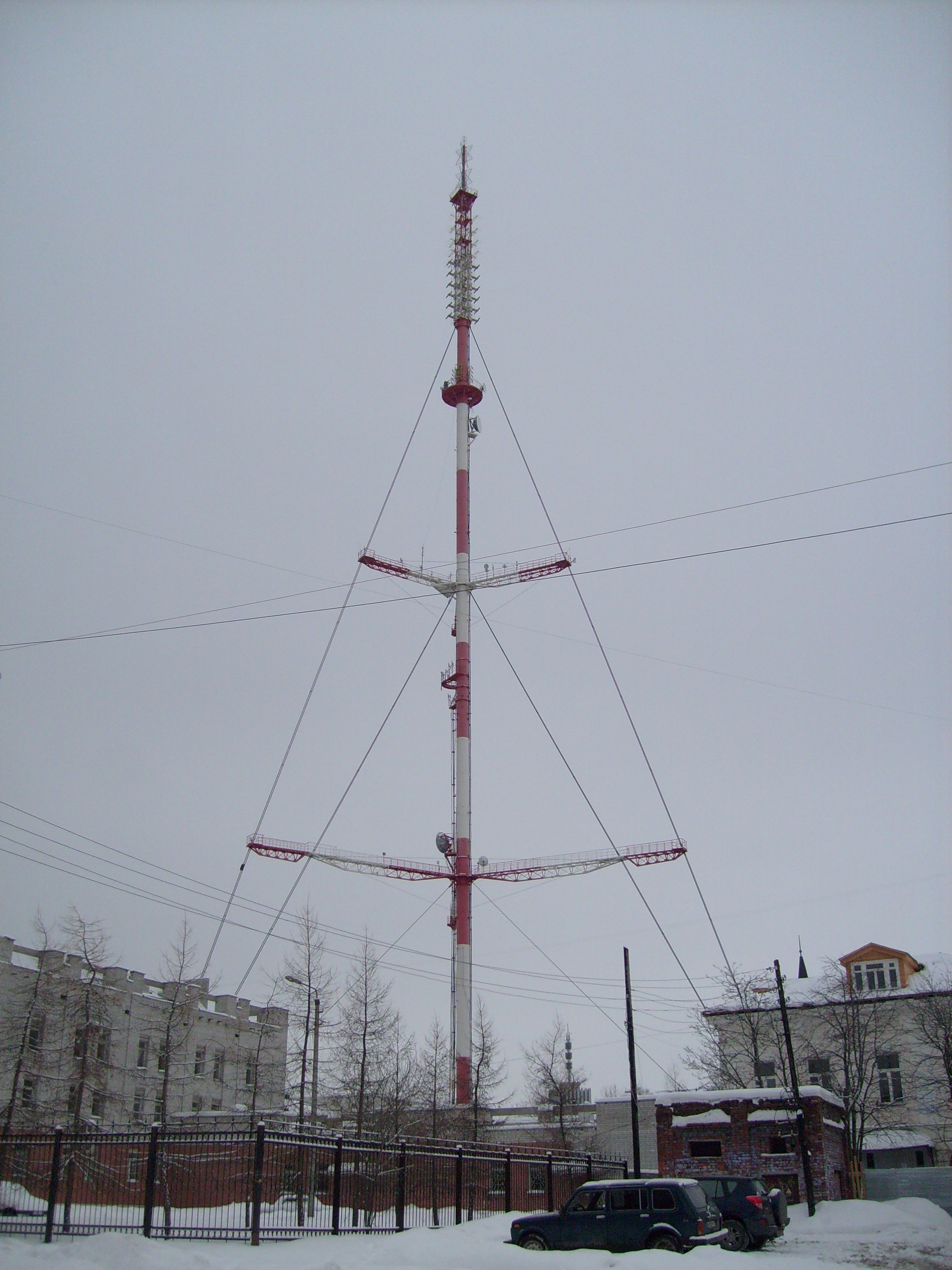 Архангельск, телевизионная башня в центре города